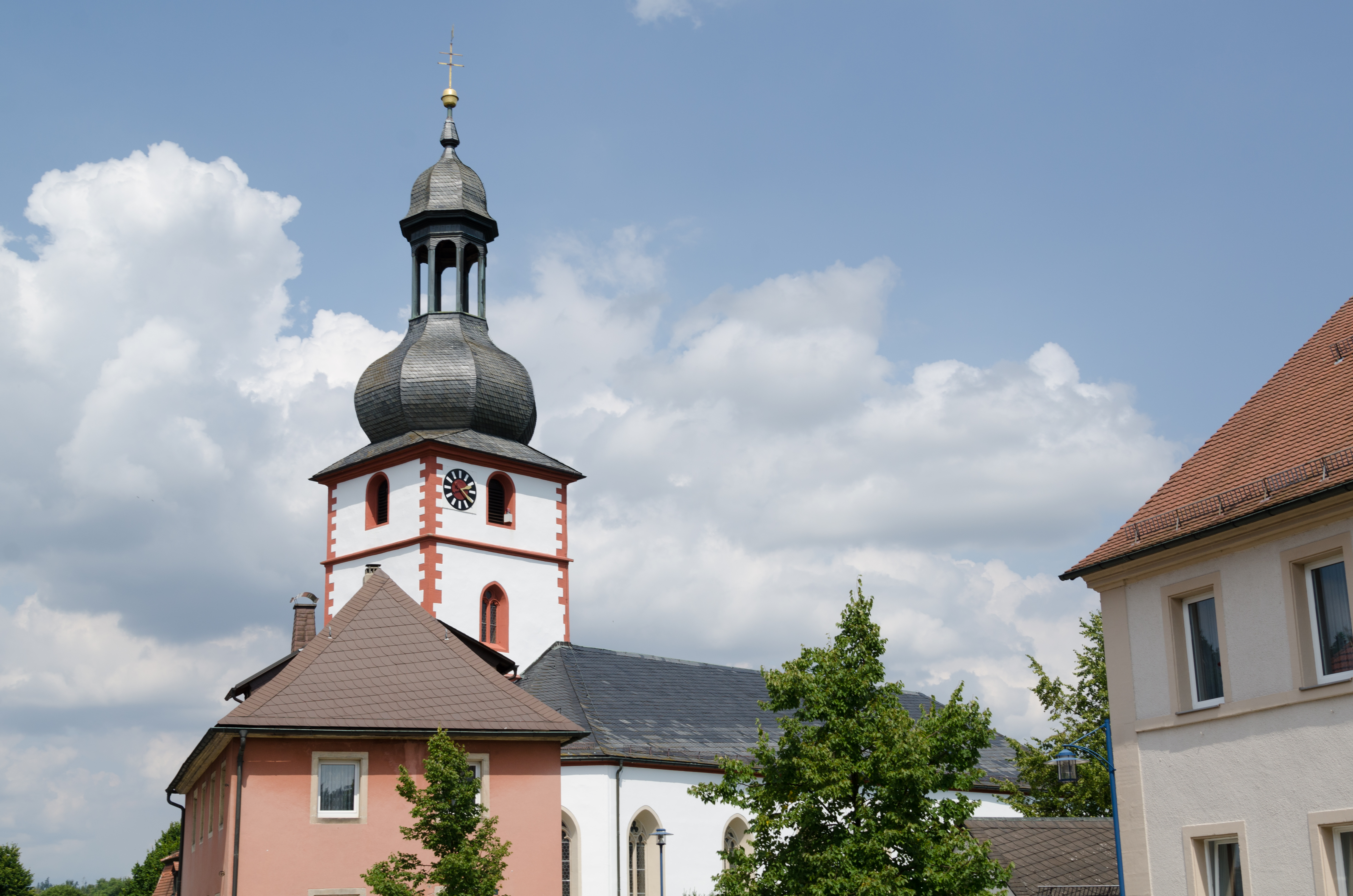 Marktschorgast, Kath. Pfarrkirche